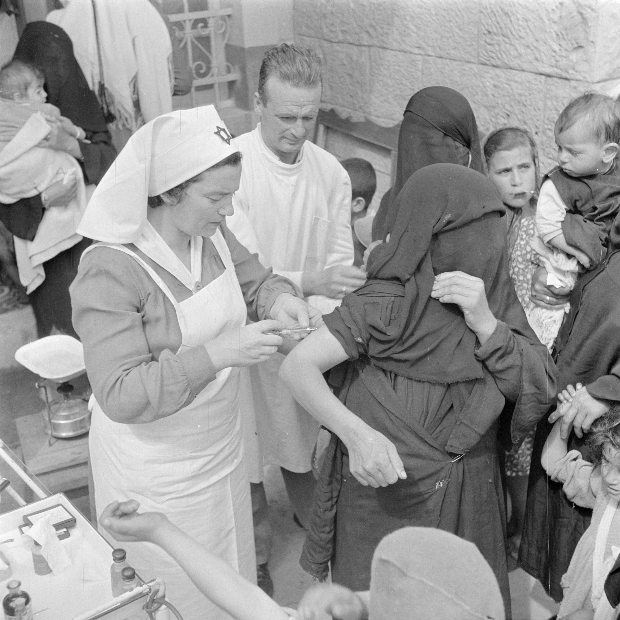 Collectie / Archief : Fotocollectie Van de Poll Reportage / Serie : Israel 1948-1949 Beschrijving : Volwassenen en kinderen in een polikliniek terwijl een verpleegkundige van de medische dienst Magen David een gesluierde vrouw een injectie toedient terwijl een mannelijke verpleegkundige toekijkt. Boek: Willem van de Poll 1895-1970. Den Haag, 2005 -photo 147 Datum : 1949 Locatie : Israël Trefwoorden : geneesmiddelen, humanitaire hulp, islamitische kleding, kinderen, uniformen, verpleegkundigen, ziekenhuizen Fotograaf : Poll, Willem van de, [onbekend] Auteursrechthebbende : Nationaal Archief Materiaalsoort : Negatief (zwart/wit) Nummer archiefinventaris : bekijk toegang 2.24.14.02 Bestanddeelnummer : 255-0950